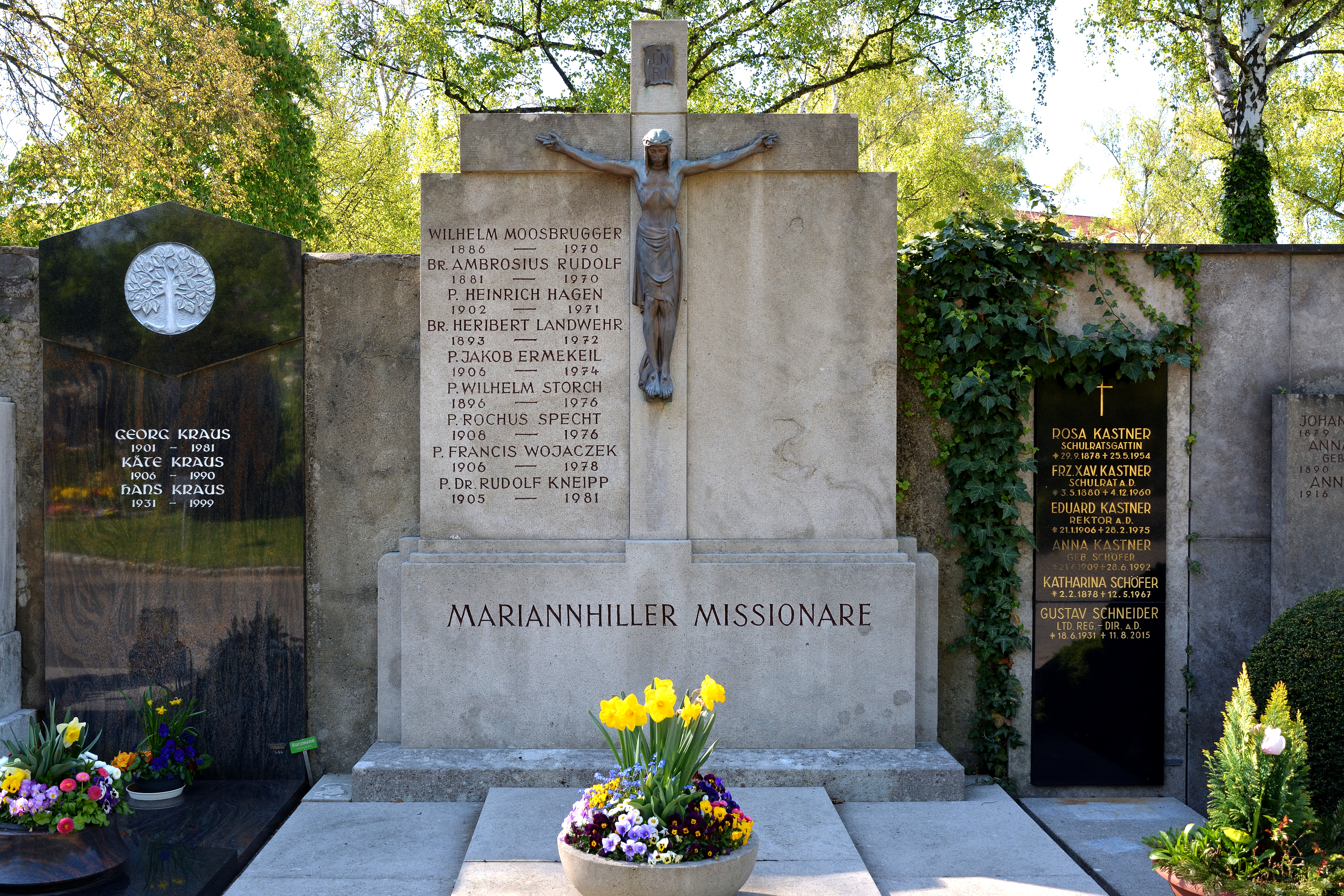 Impressionen vom Hauptfriedhof Würzburg Grabstätte der Mariannhiller Missionare